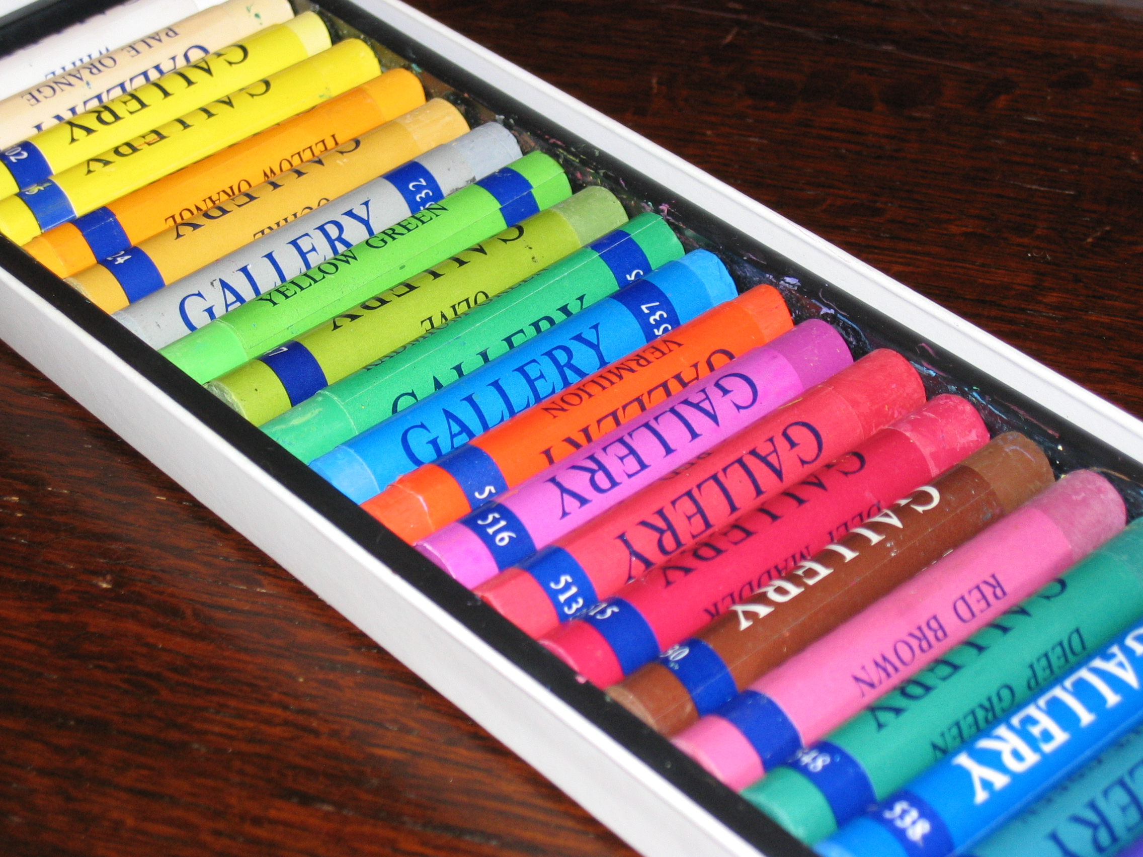 Commercial pastels